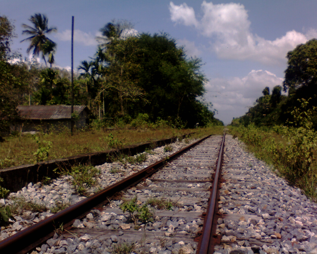 Phru Yai train stop